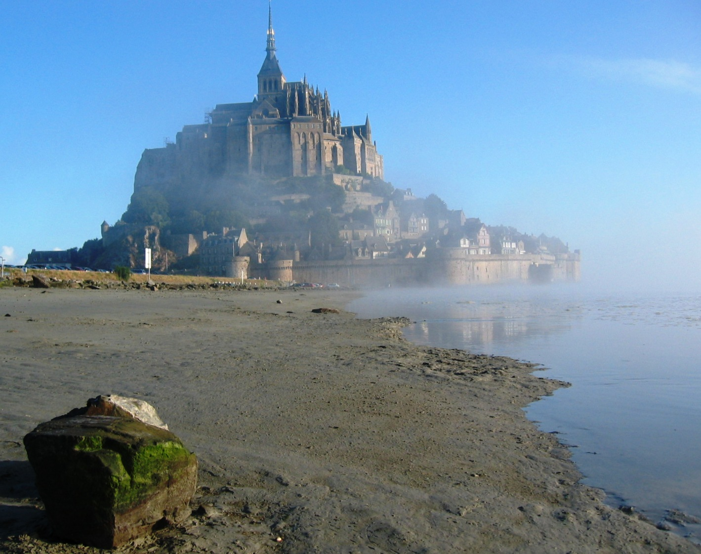 Der Klosterberg Mont-Saint -Michel (Frankreich, Normandie)